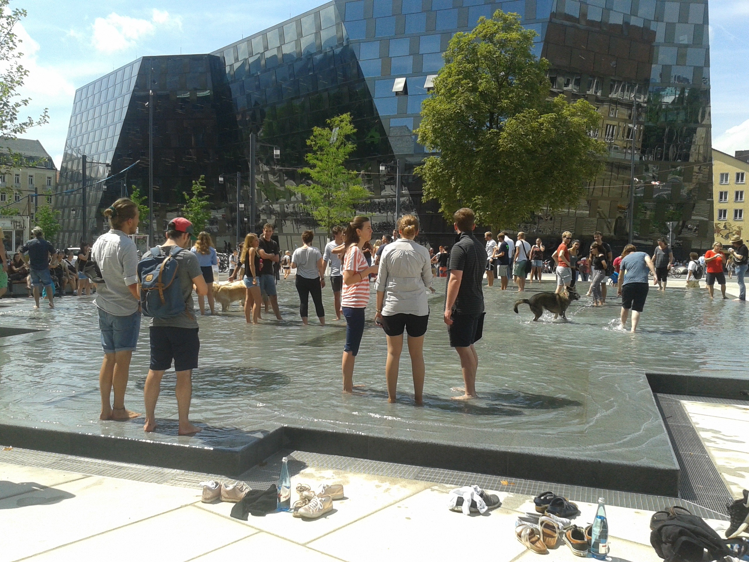 Der "Gedenkbrunnen" zur Erinnerung an die zerstörte Synagoge, am Tag seiner Eröffnung, 2. August 2017.